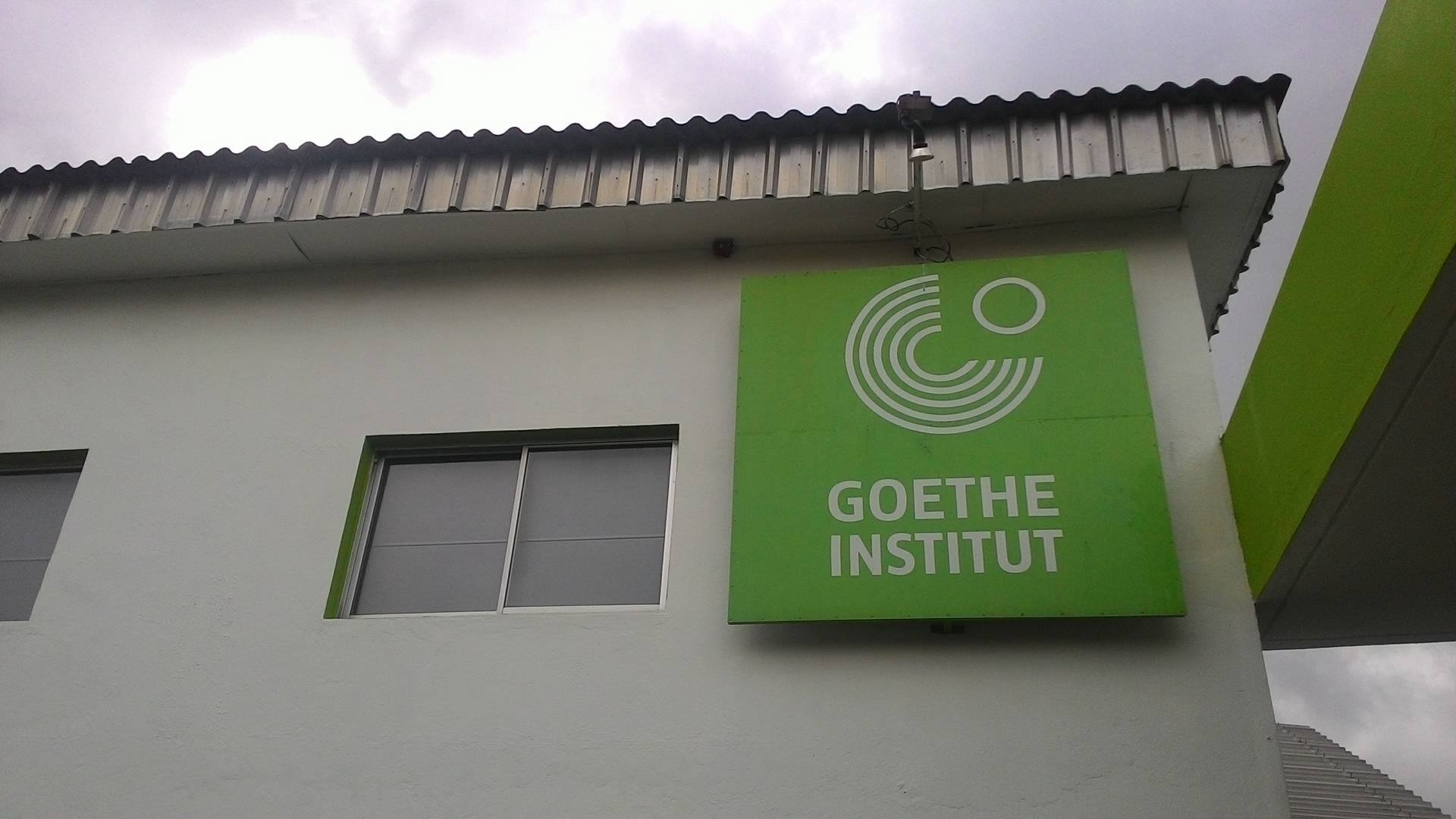 Le Goethe Institut Côte d'Ivoire a accueilli l'assemblée générale